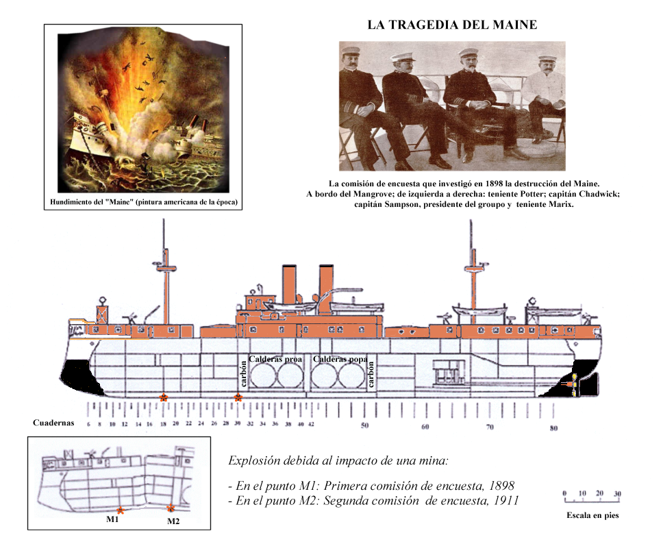 La tragedia del USS Maine, explicación gráfica